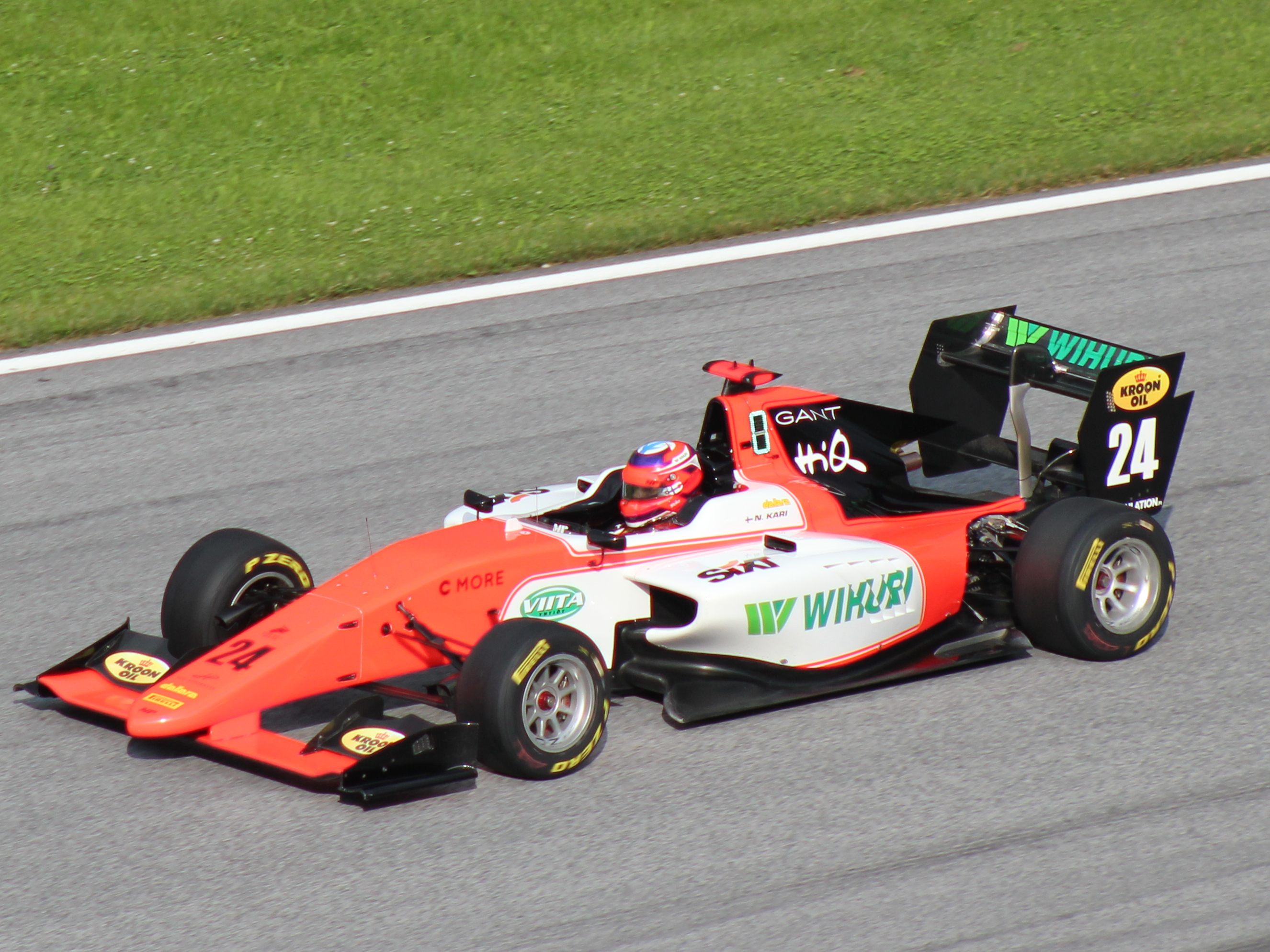 24 Niko Kari beim Rennwochenende in Österreich 2018